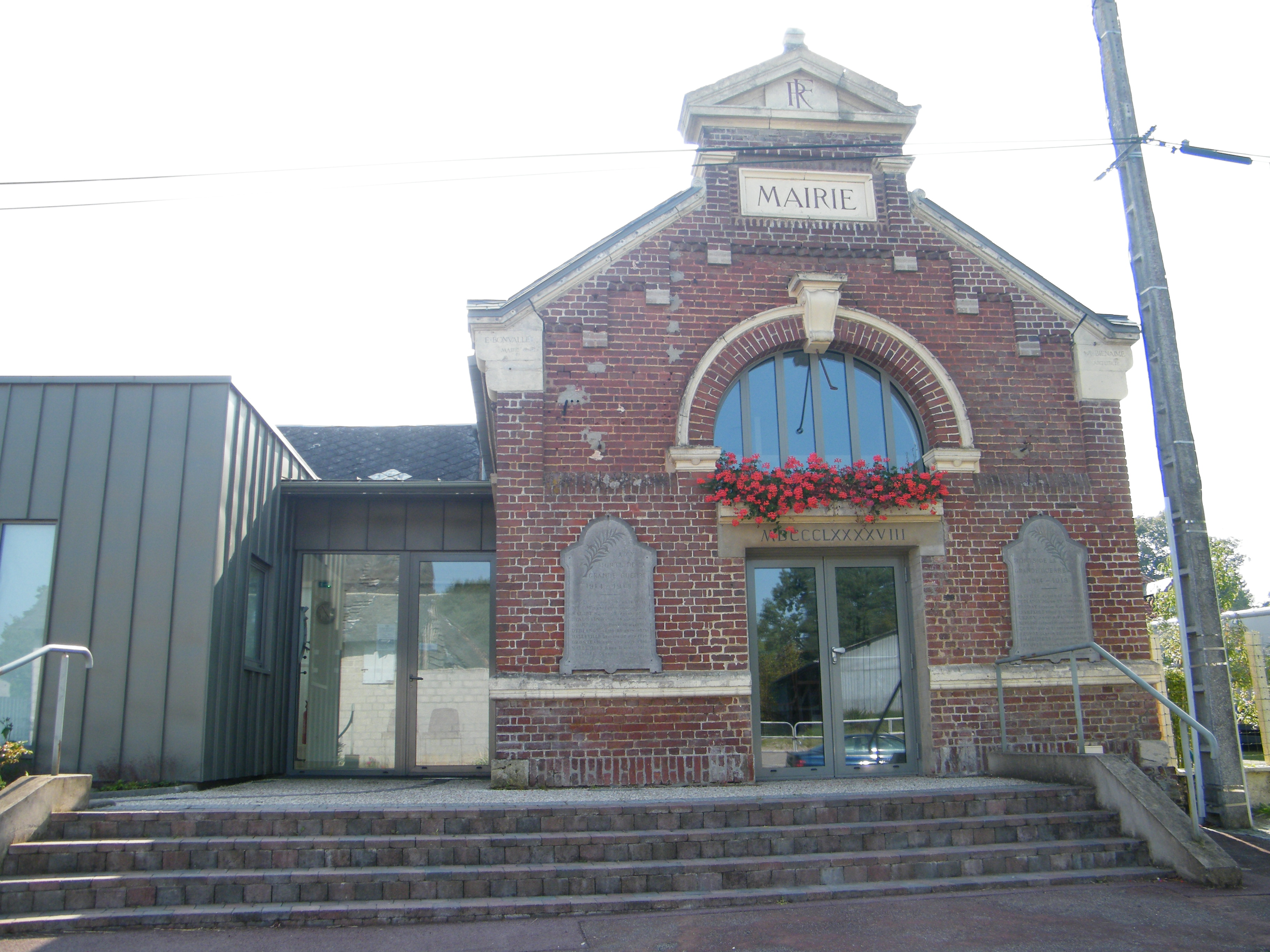 Saint-Maxent, Somme, Fr, mairie datée de 1898.